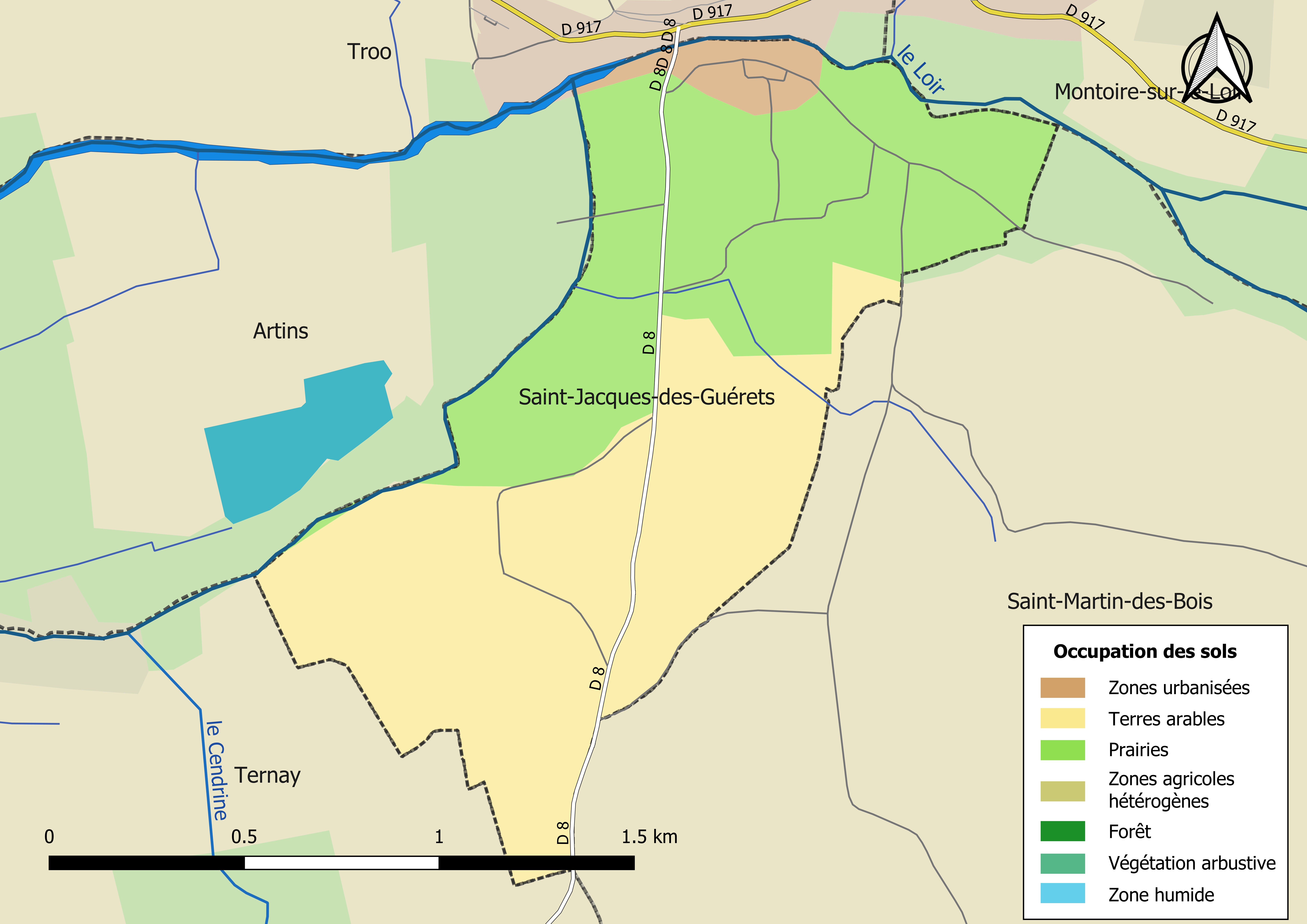 Carte des infrastructures et de l’occupation des sols en 2018 de la commune de Saint-Jacques-des-Guérets (France).